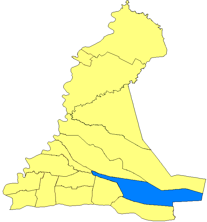 Mapa de Laureles, Paraguay.